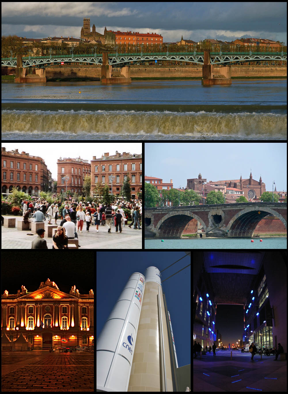 Images, De haut en bas et de gauche à droite : Pont Saint-Pierre de Toulouse : File:Pont_Saint-Pierre2.jpg par Aleske. Place du Capitole : File:Capitole_de_Toulouse_en_jardin_3.JPG par Gloumouth1. Pont-Neuf de Toulouse : File:Pont-Neuf_de_Toulouse.jpg par 4nitsirk [1] Capitole de Toulouse : File:Place_du_Capitole_Toulouse.jpg par chantrybee [2] Ariane 5, Cité de l’Espace : File:Ariane 5 at Cite de l'Espace 3.jpg par Mike Peel [ Minimes File:Toulouse_Minimes.jpg par AlphaTangoBravo / Adam Baker [3].